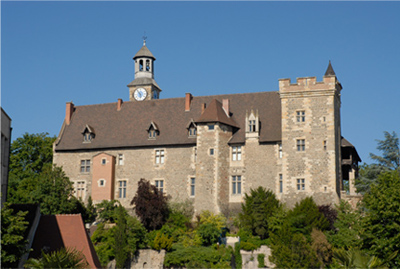 Château emblématique de Montluçon